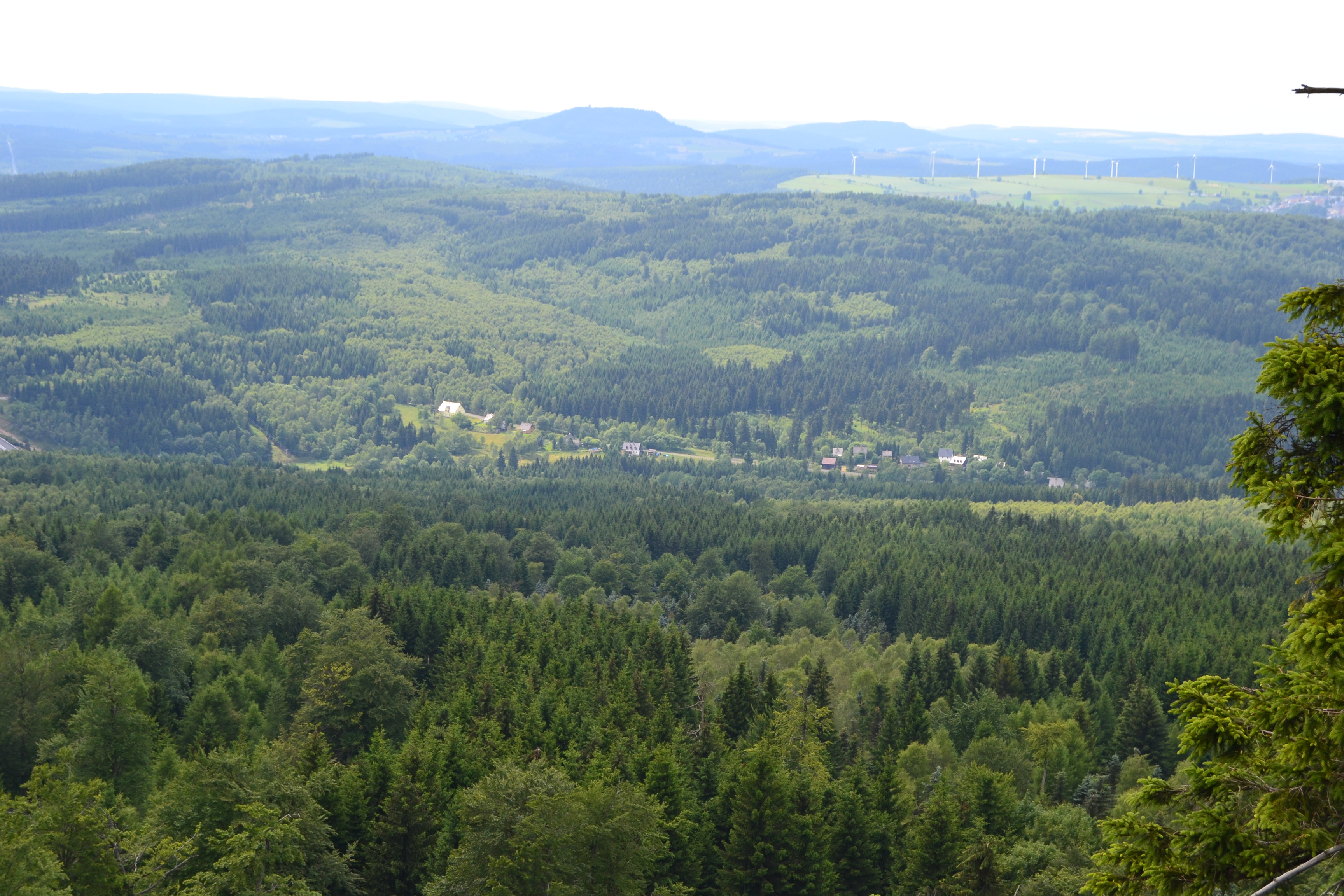 Ein teil von Kryštofovy Hamry im Mittleren Erzgebirge, gesehen vom Jelení hora. Im Hintergrund (Bildmitte) ist der Scheibenberg erkennbar.